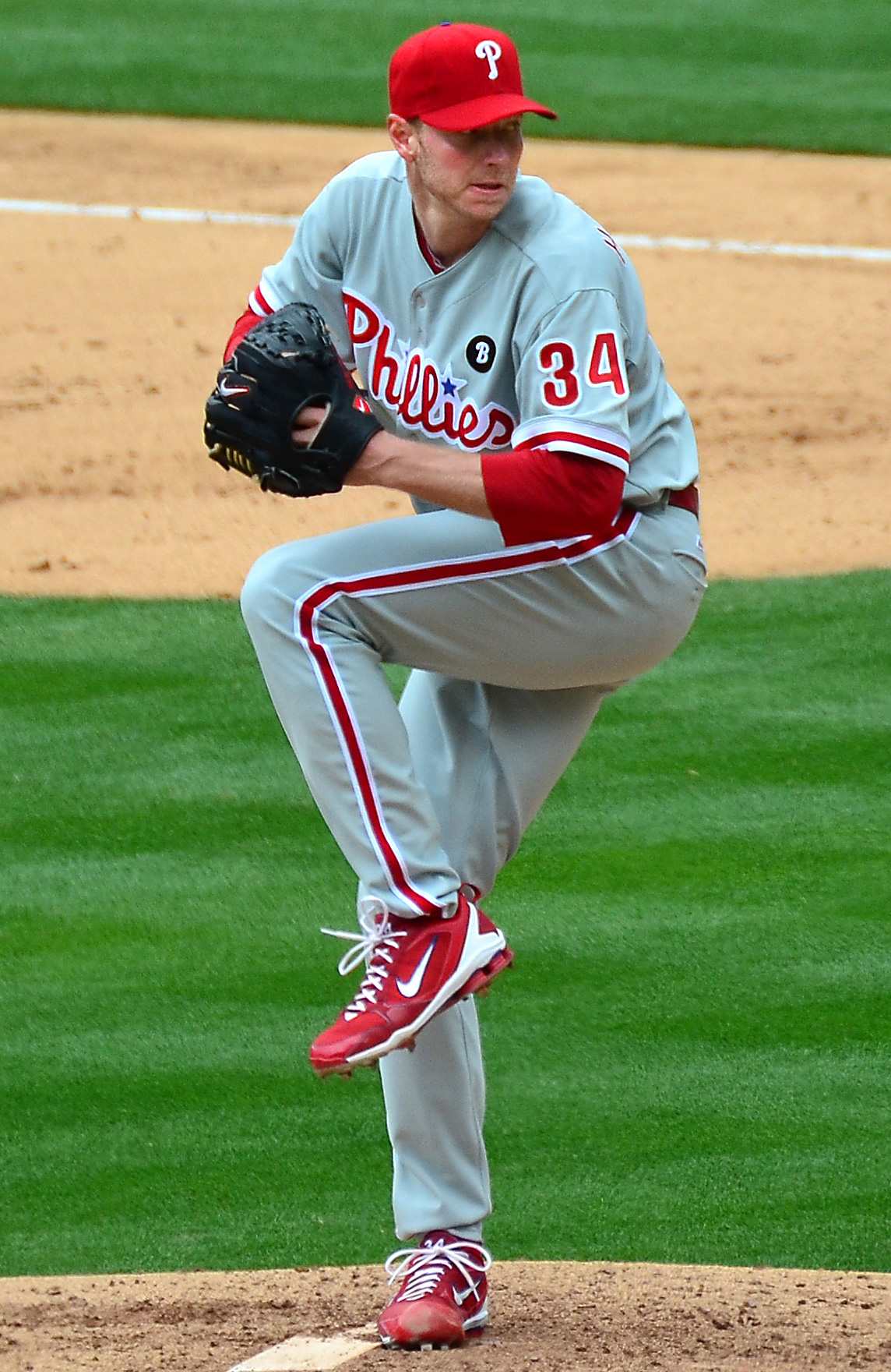 Roy Halladay